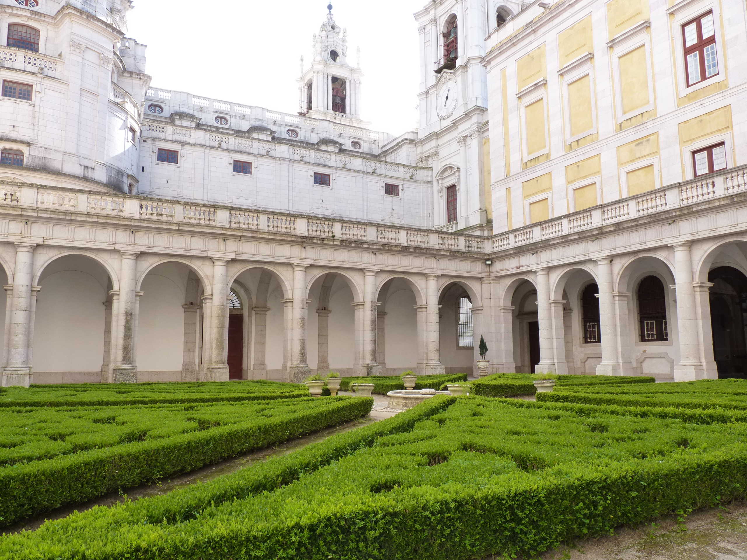 Convento de Mafra This file was uploaded for Wiki Loves Monuments in Portugal with the unique identifier 69940.